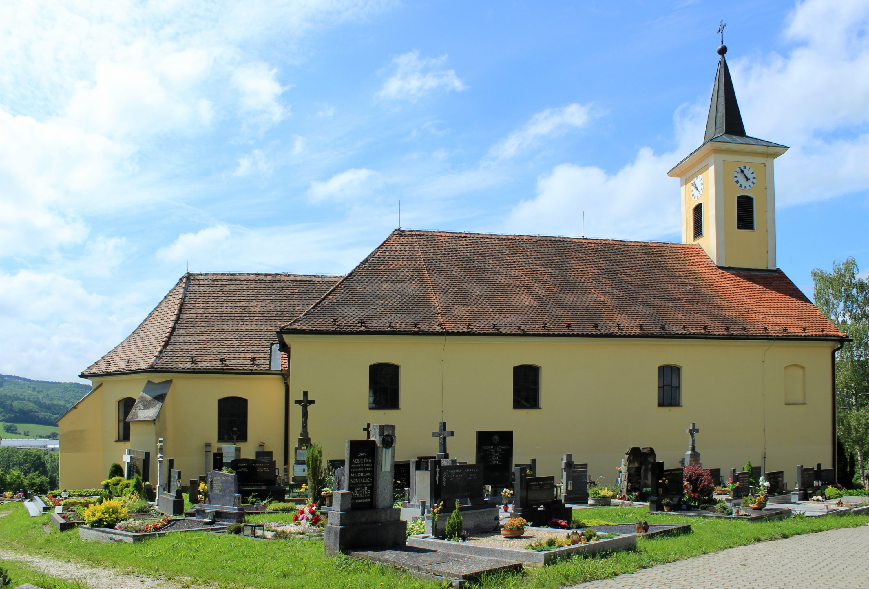 Nezdenice, kostel sv. Petra a Pavla.